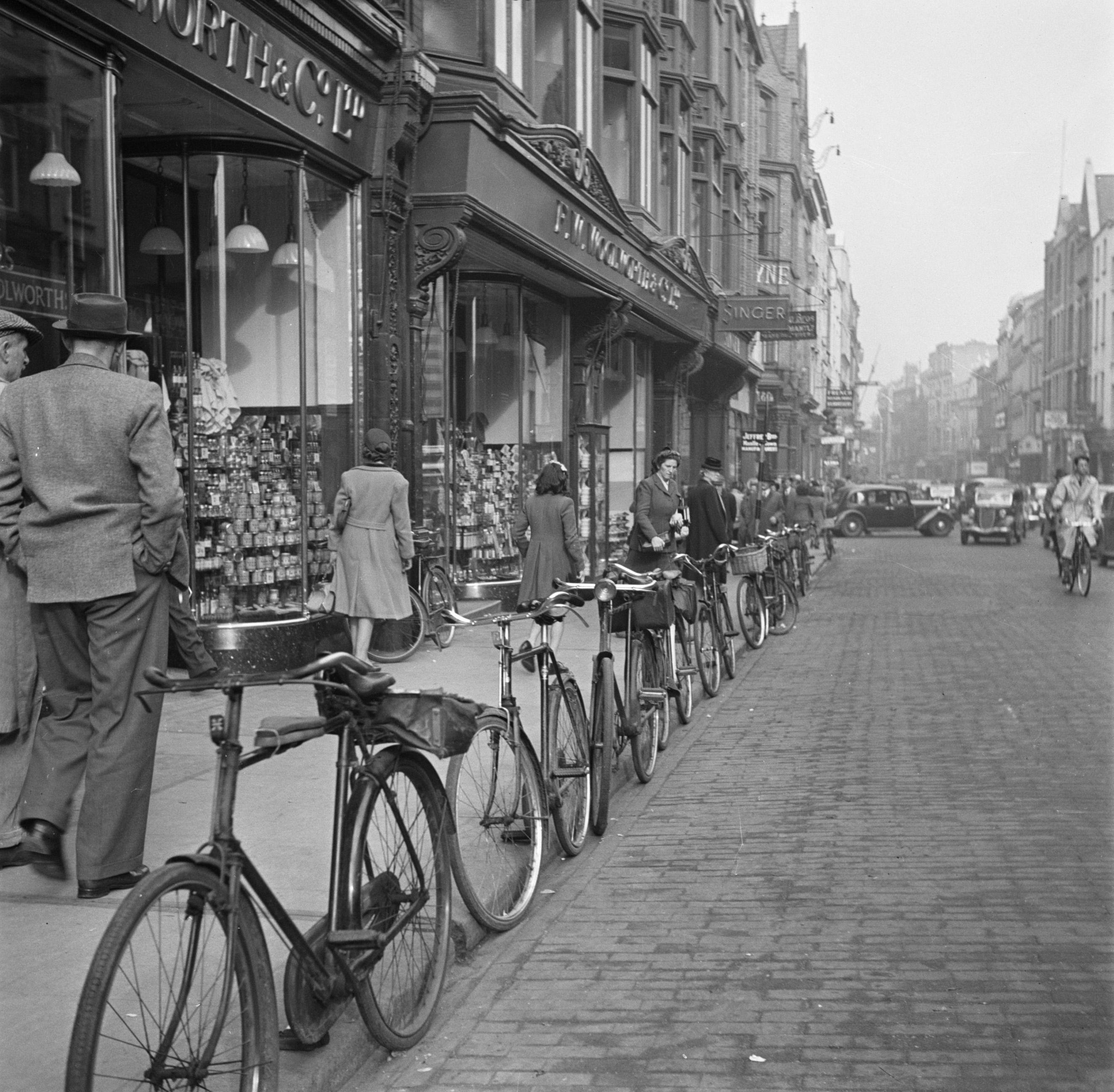 Collectie / Archief : Fotocollectie Van de Poll Reportage / Serie : Dublin Beschrijving : Fietsen staan tegen de stoeprand geparkeerd in een straat in Dublin Datum : 1946 Locatie : Dublin, Ierland Trefwoorden : fietsen, straatbeelden Fotograaf : Poll, Willem van de Auteursrechthebbende : Nationaal Archief Materiaalsoort : Glasnegatief Nummer archiefinventaris : bekijk toegang 2.24.14.02 Bestanddeelnummer : 191-0869